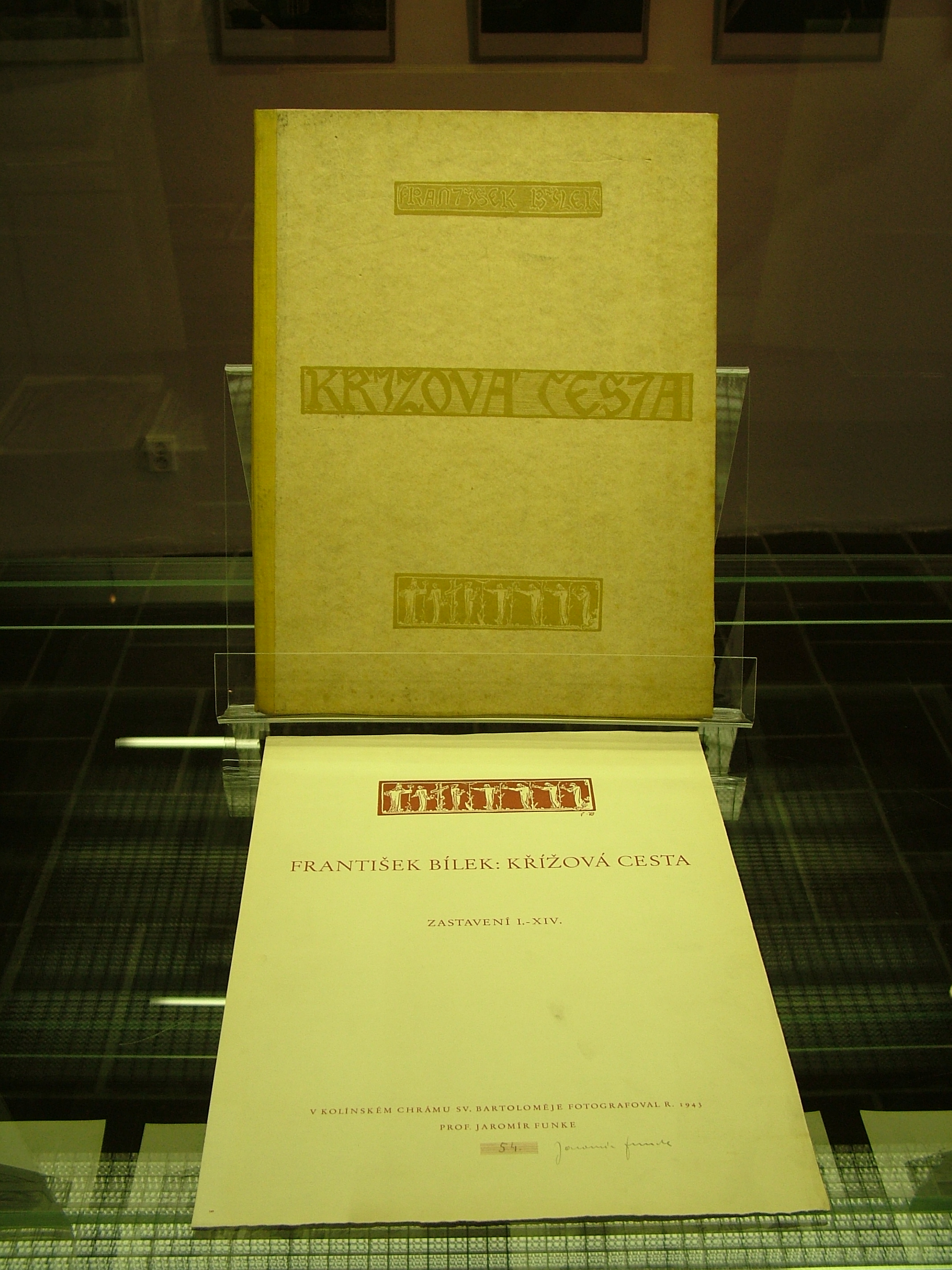 Jaromír Funke; Chrám sv. Bartoloměje ve fotografiích Jaromíra Funkeho (23. 6. 2011 – 28. 8. 2011) Regionální muzeum v Kolíně, Červinkovský dům, Brandlova 27, Kolín 1